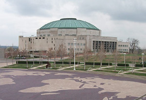 Tomada por el usuario John Hamer